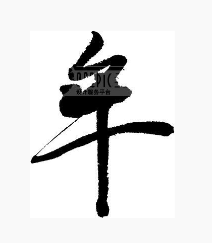 моу рукопись